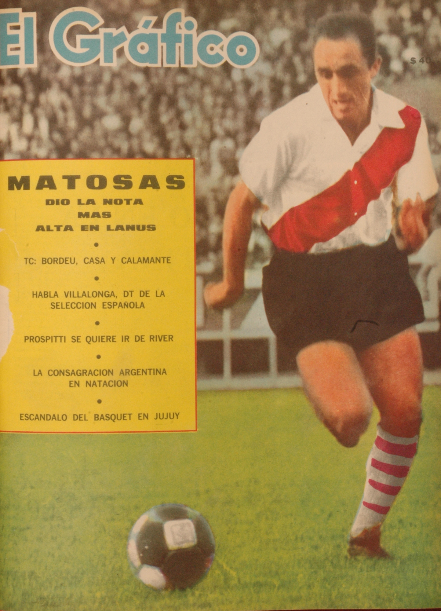 El Grafico del 22 de Marzo de 1966. Edicion 2424